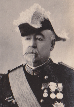 Portrait du Général Saussier (1828-1905), Gouverneur Militaire de Paris de 1884 à 1897.